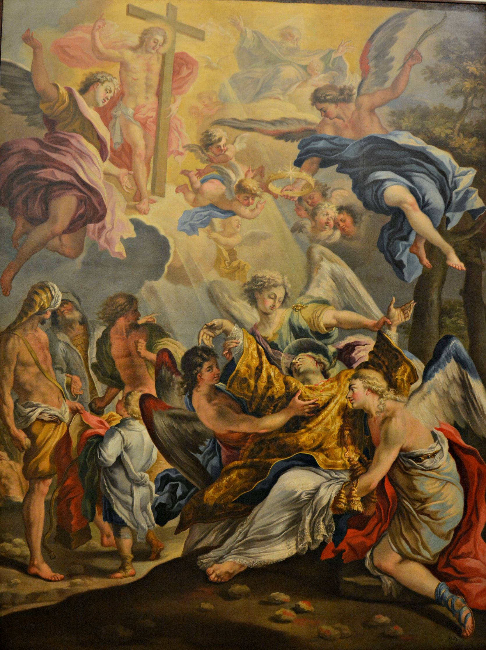 Lapidazione di santo Stefanotitle QS:P1476,it:"Lapidazione di santo Stefano" label QS:Lit,"Lapidazione di santo Stefano"